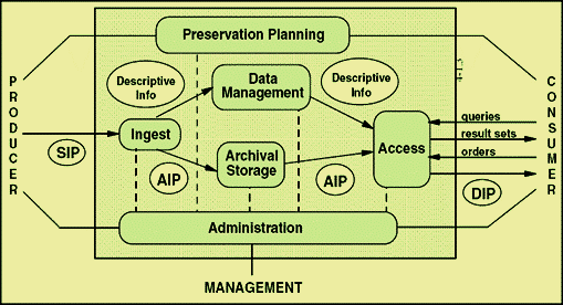 OAIS modellen